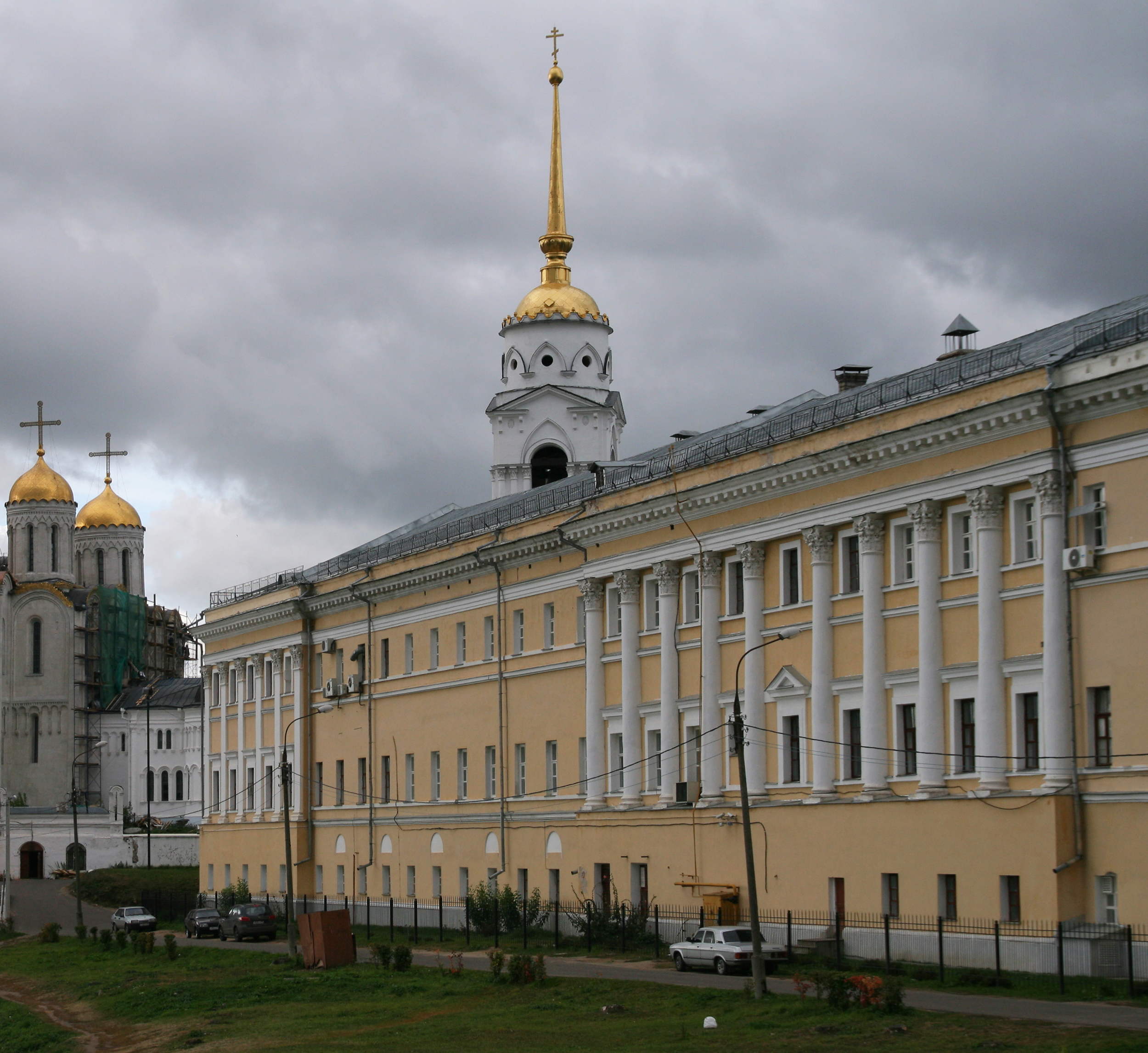 Губернские присутственные места, 1785-1790, арх. Бланк К.И., Владимир